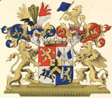 Köhleri suguvõsa vabahärravapp